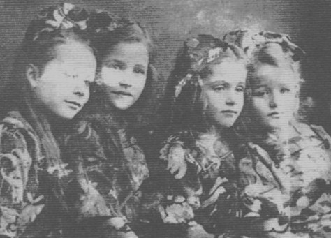 ゲオルグ・デ・ラランデとエディータの4人の娘 左から長女ウルズラ、次女オッティ、三女ユキ、四女ハイディ